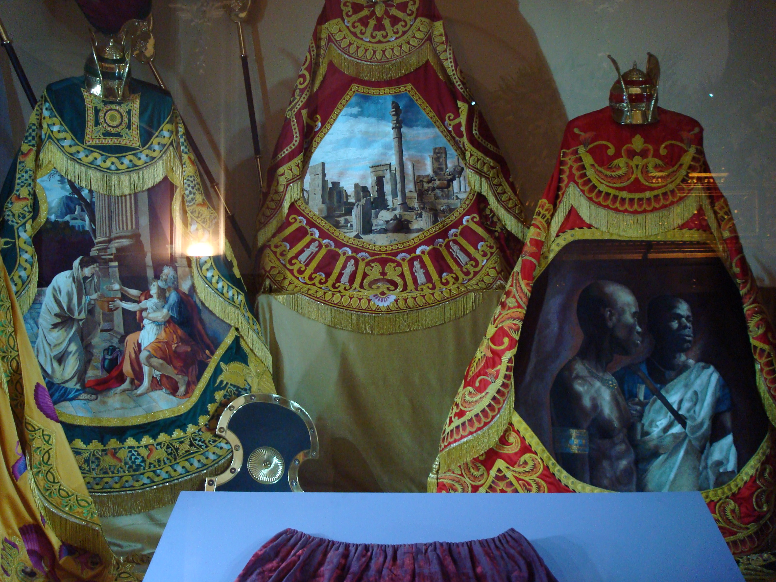 Mantos bordados del Paso Blanco representando pasajes del Antiguo Testamento, Semana Santa Lorca